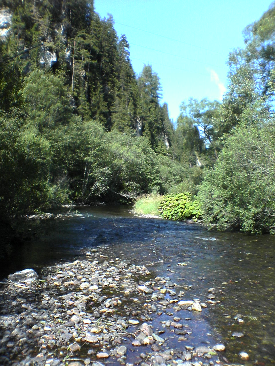 Čierny Váh, above Svarín3